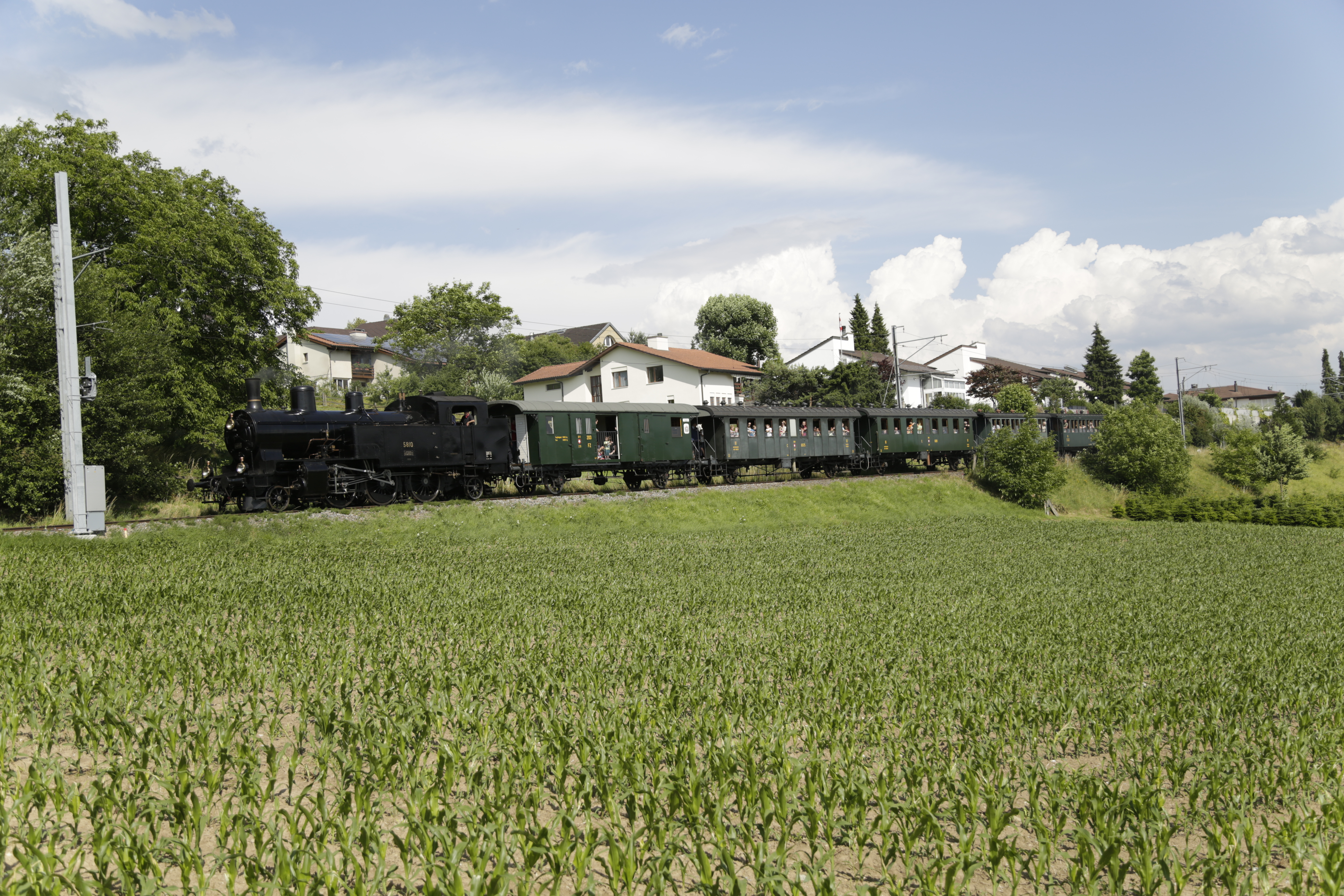 Die SBB Eb 3/5 der Dampfbahn Bern vor einem Extrazug zwischen Bremgarten West und Wohlen